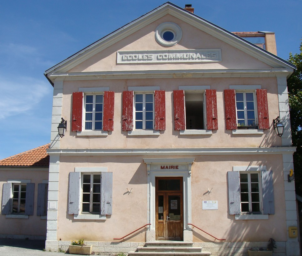 La mairie de Saint-Pierre-d'Argençon.